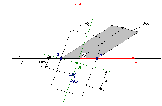 Boat Stability